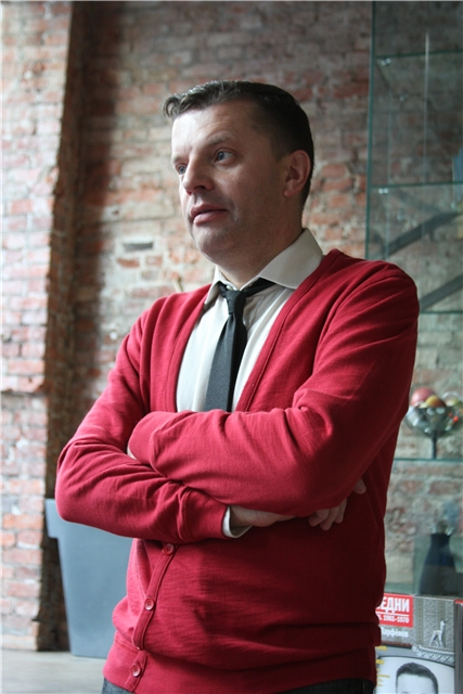 Леонид Парфенов